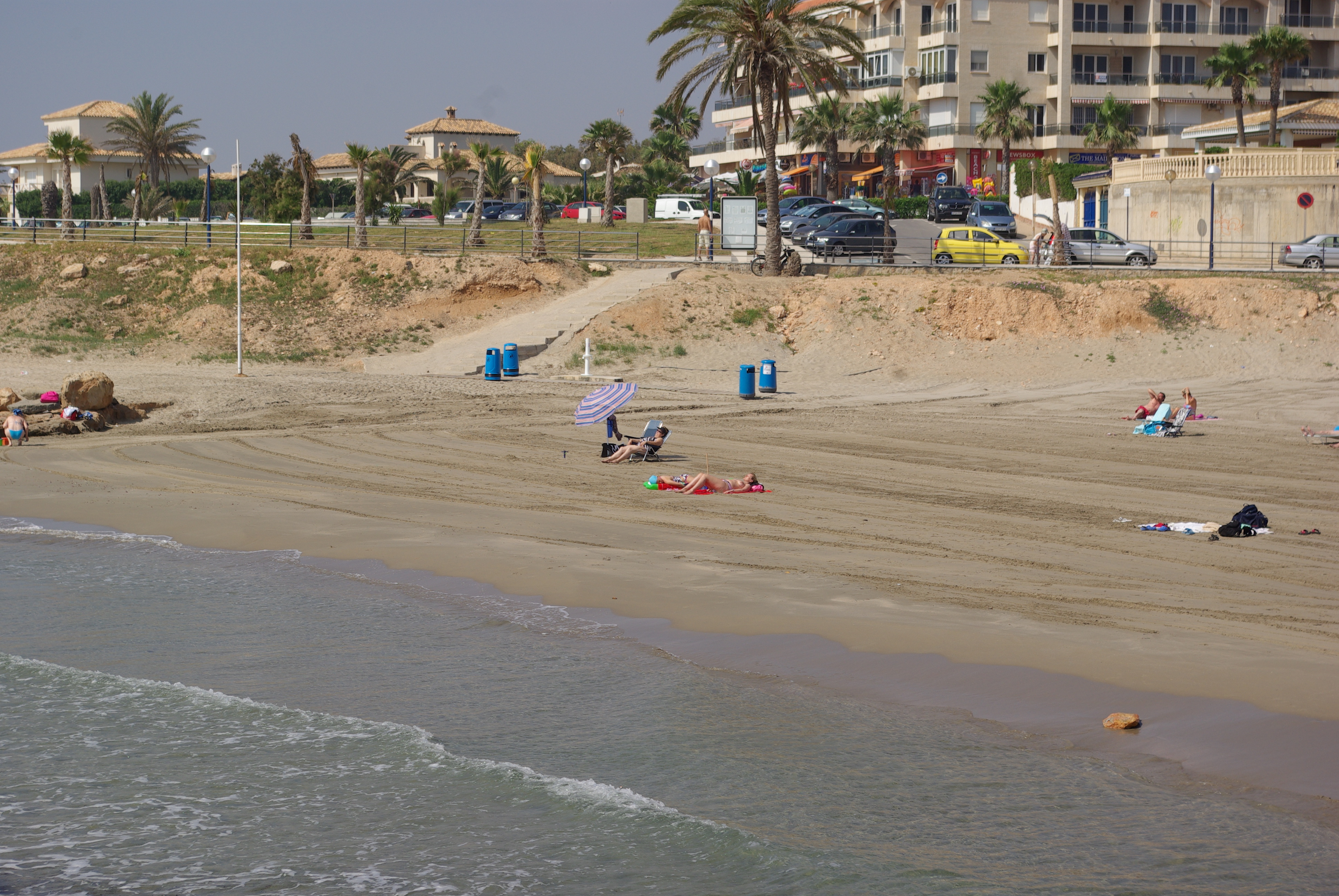 ® S.D. ORIHUELA COSTA- PLAYA FLAMENCA - VISTAS